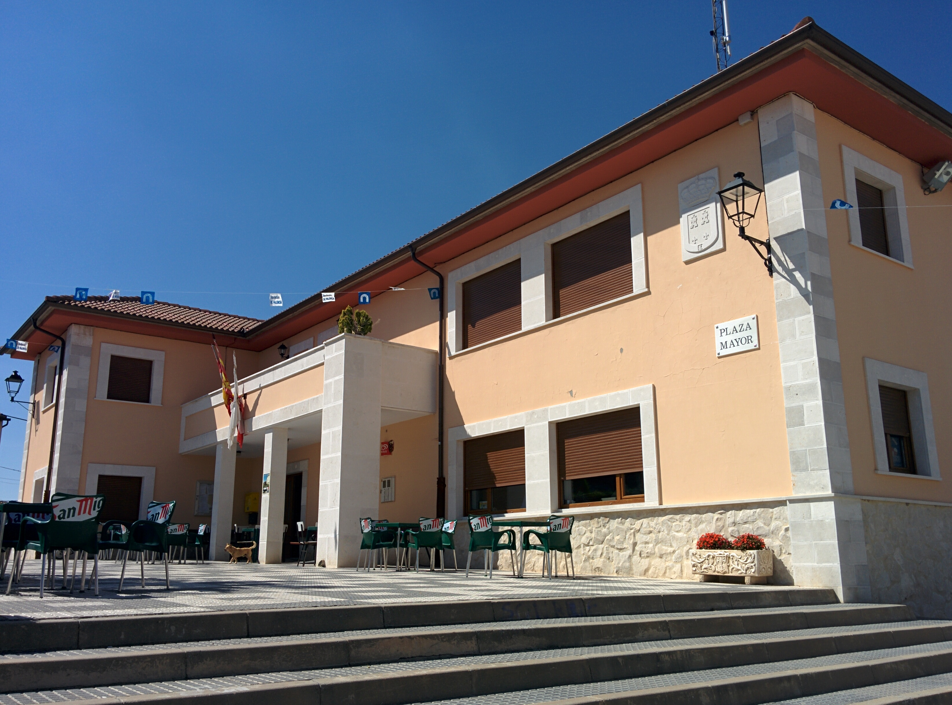 Casa consistorial de Alba de Cerrato (Palencia, España).